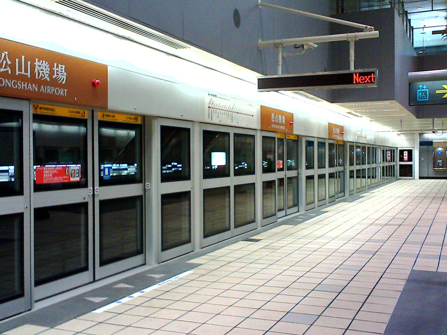 臺北捷運松山機場站一號月台。